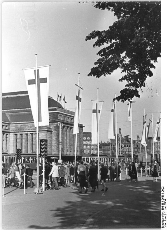 Leipzig, Hauptbahnhof, Vorplatz Zentralbild Illner Be-Sch 3 Motive 6.7.1954 Deutscher Evangelischer Kirchentag in Leipzig vom 7.4. bis 11.4.1954 UBz: Der zu Ehren des Kirchentages ausgeschmückte Vorplatz vom Leipziger Hauptbahnhof.